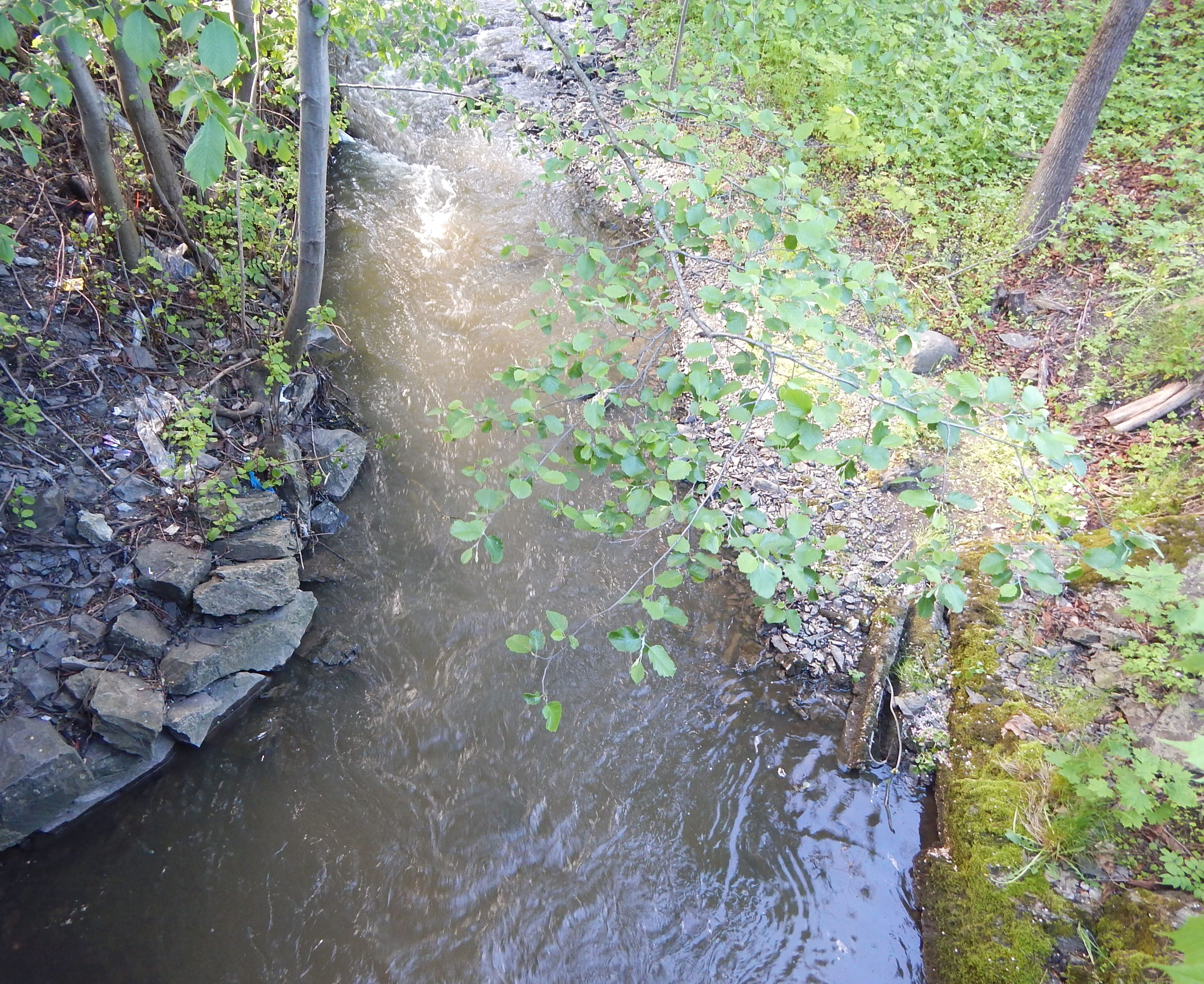 Hoffselva like over Engebrets vei